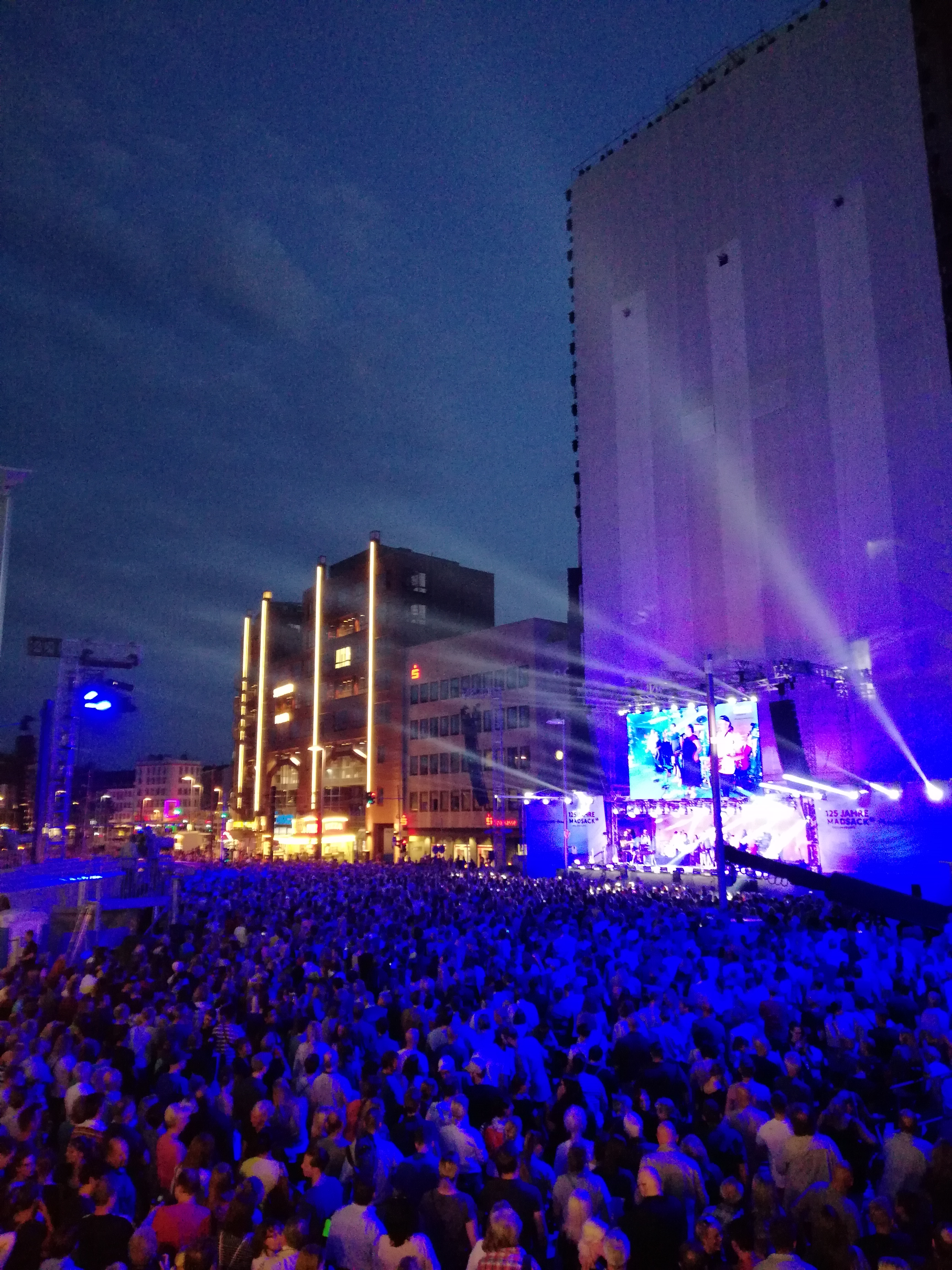 Zur Feier des 125sten Gründungsjubiläums der Madsack Mediengruppe am 16. Juni 2018 auf der Goseriede vor dem Anzeiger-Hochhaus gratulierten zahlreiche Prominente vor rund 50.000 Gästen des Open-Air-Festivals. Zu den Künstlern zählten unter anderem Mousse T & Band, Lukas Rieger, Spax, Michael Schulte, Sarah Lombardi, Lions Head, Glasperlenspiel und Sasha. Neben Livemusik wurde eine spektakuläre Video-und-Tanz-Show an der Fassade des Anzeiger-Hochhauses als Höhepunkt des Abends aufgeführt ...